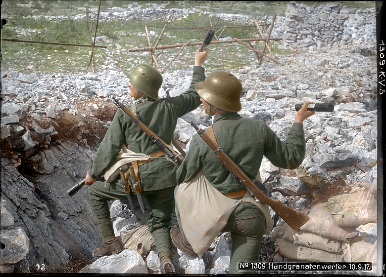 Kolorizacija vojakov pri metanju granat na soški fronti.